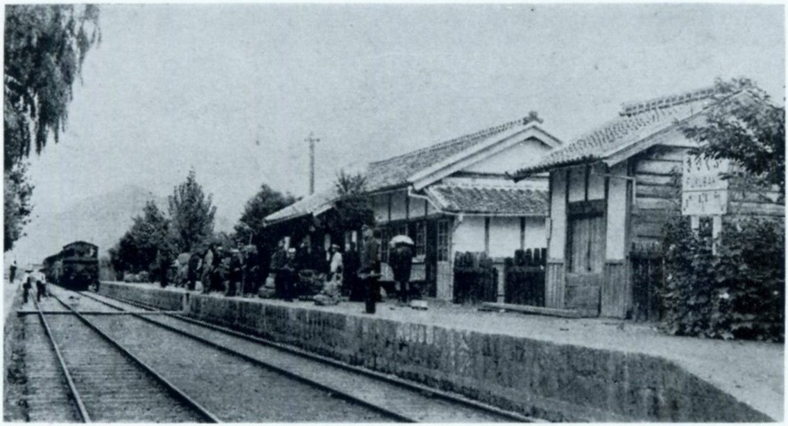 開業当時の福崎駅。福崎町・和田芳夫蔵。駅員がスタフ(棒状通票、現在では名鉄築港線・津軽鉄道でしか使われていない)を持って立っている。「むかしの西播磨 絵はがきに見る明治大正昭和初期」(1995年)では鮮明に見開き掲載。